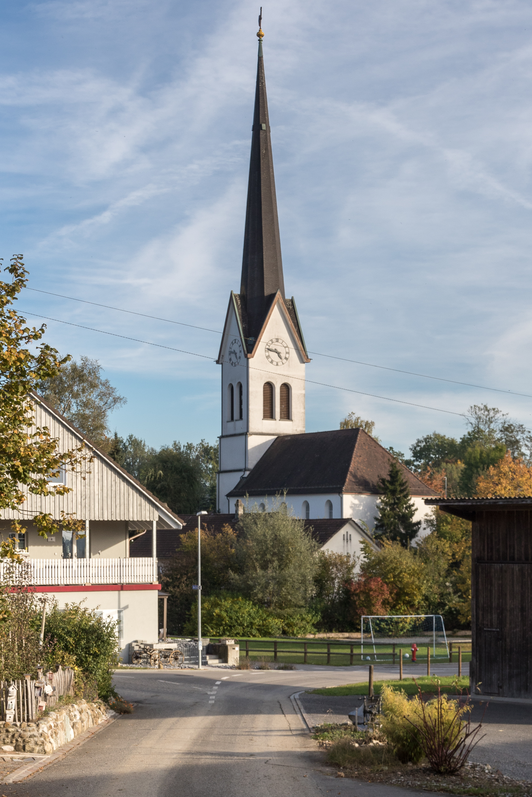 Reformierte Kirche in Alterswilen TG